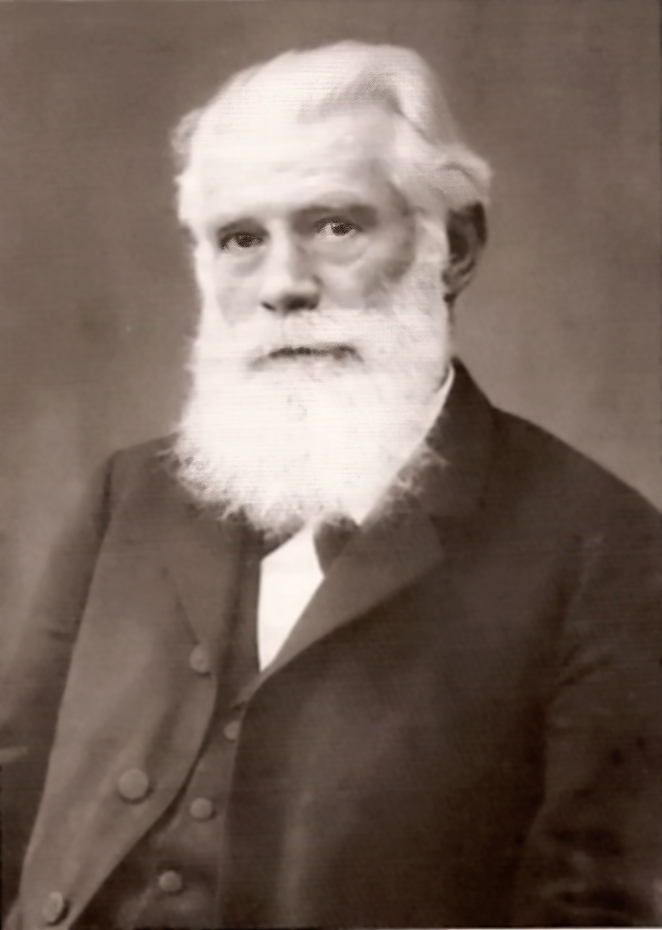 Theodor von Gimborn (1840-1916), Ingenieur und Unternehmer in Emmerich am Rhein